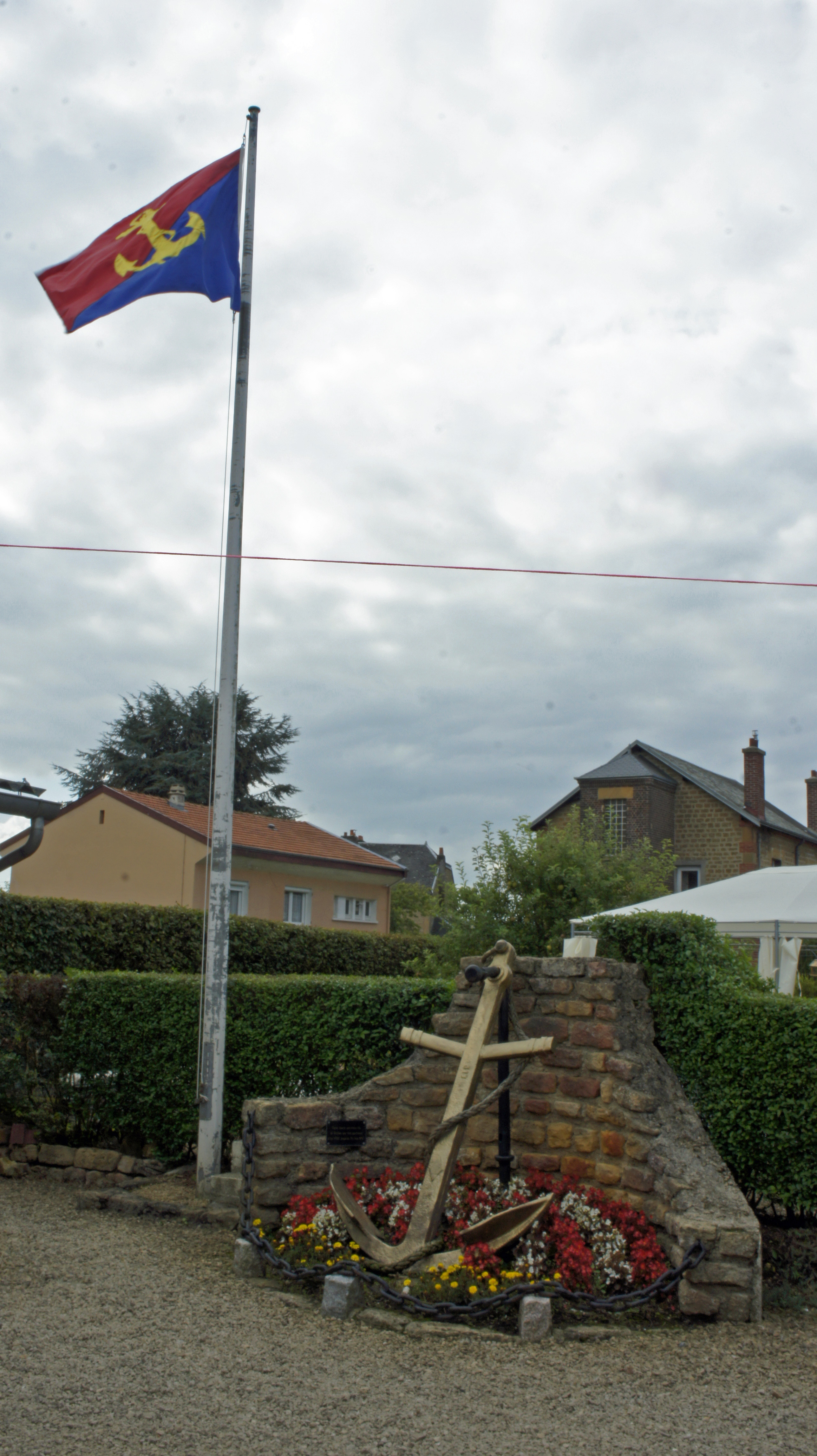 Lieu de réunion des anciens des troupes de marine.